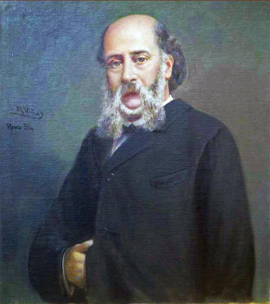 Retrato de Pedro Mata y Fontanet (1811-1877).